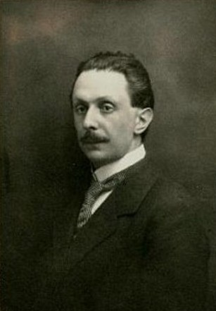 Bohuslav Hostinský (1884 - 1951), Český matematik a fyzik.